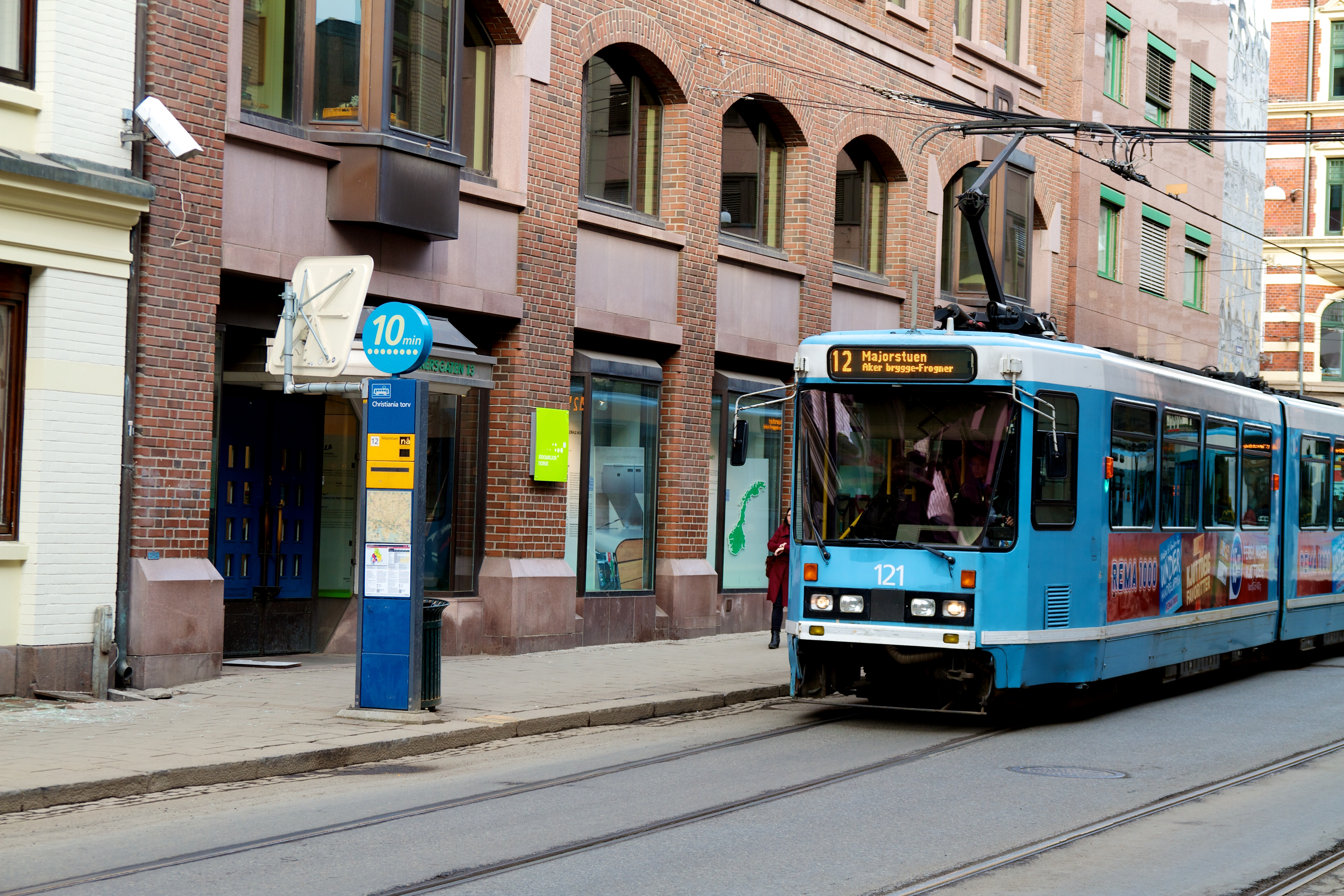 Trikkeholdeplassen Christiania torv i Oslo